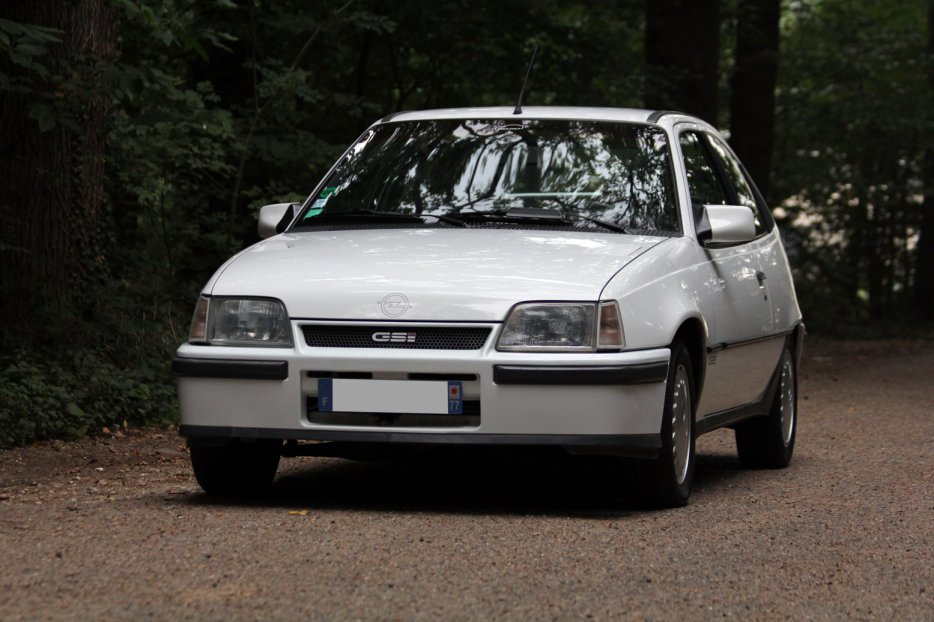 Opel Kadett GSi